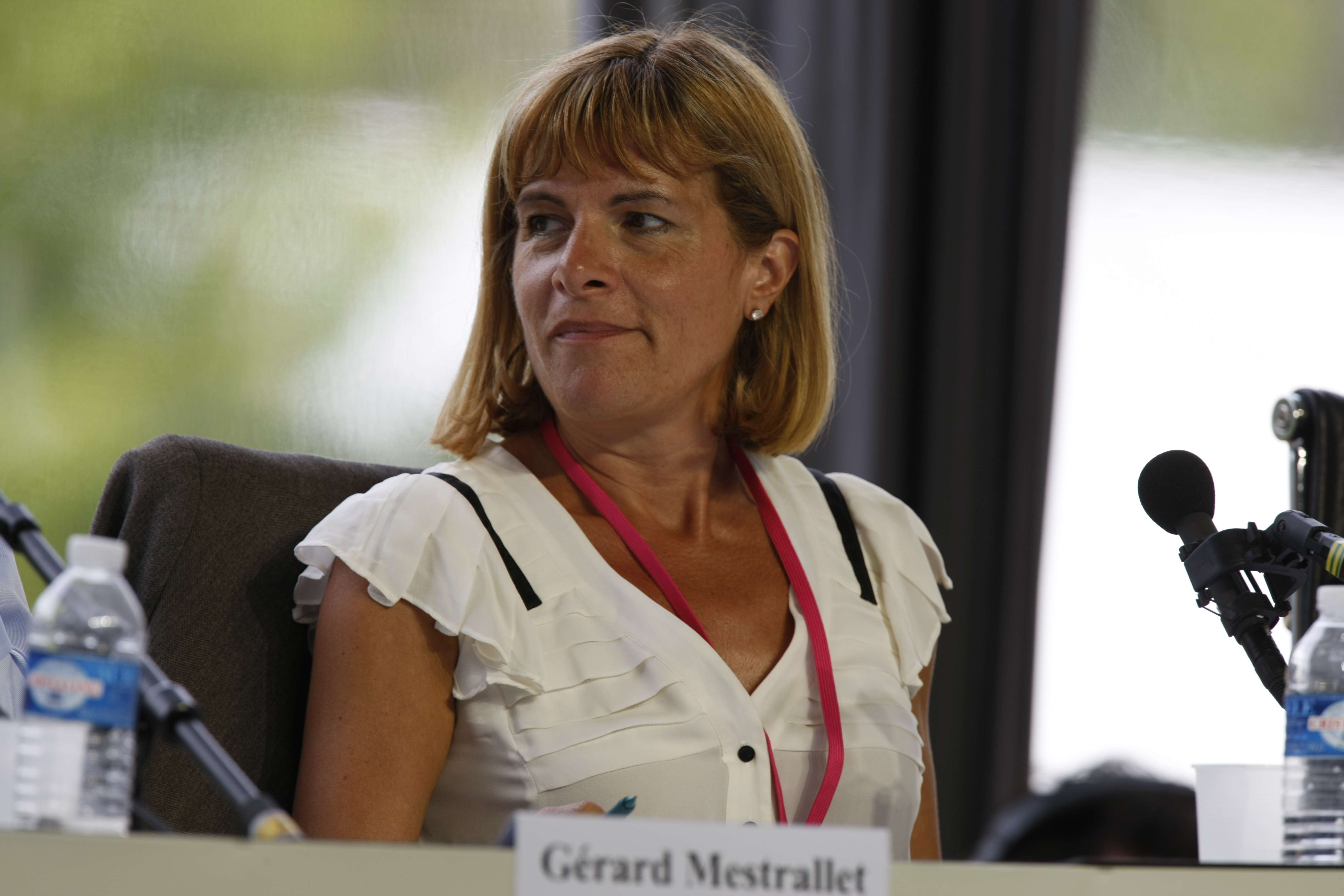 Anne Lauvergeon à l'Université d'été du MEDEF en 2009